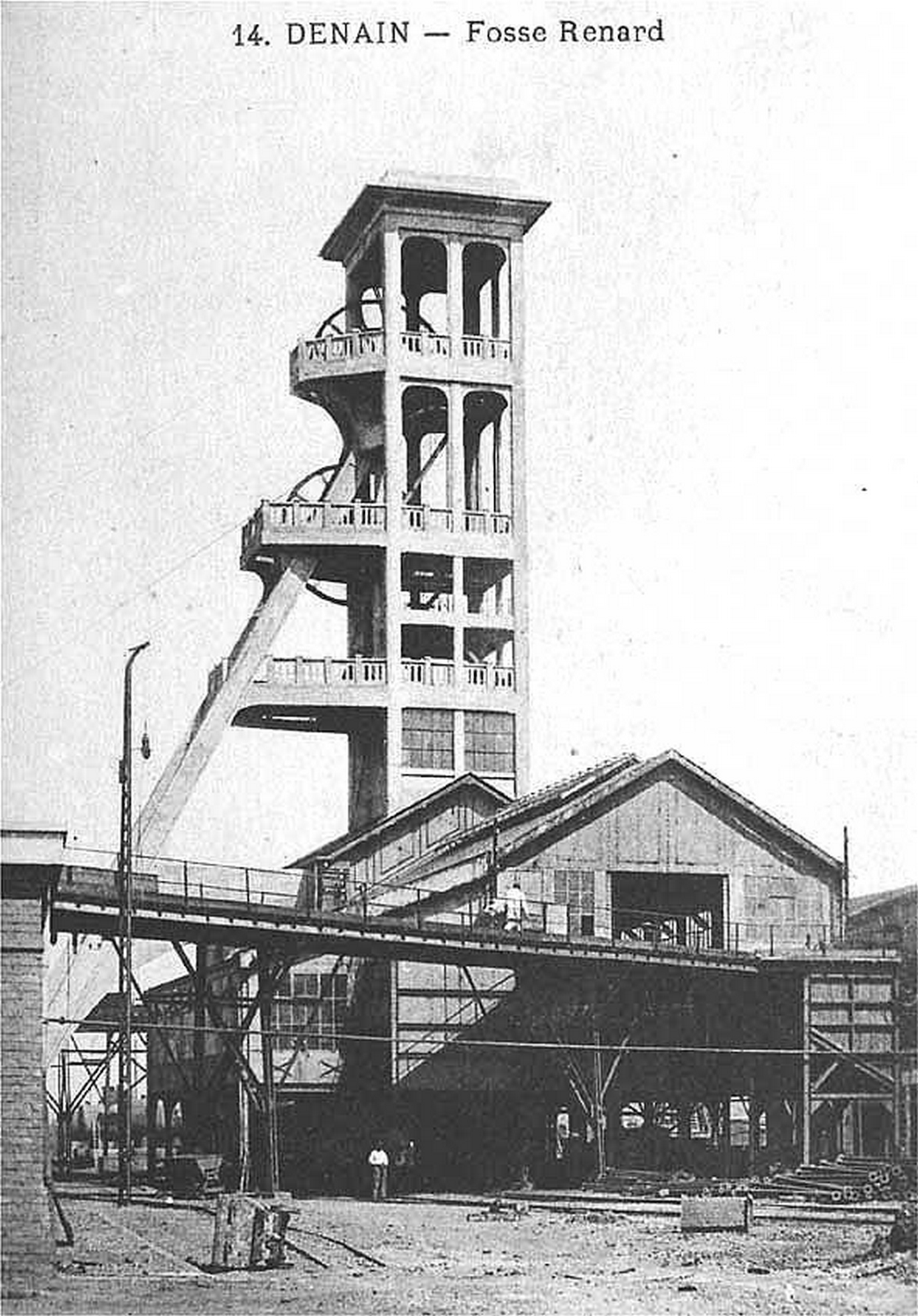 La fosse Renard de la Compagnie des mines d'Anzin était un charbonnage constitué de deux puits situé à Denain, Nord, Nord-Pas-de-Calais, France.